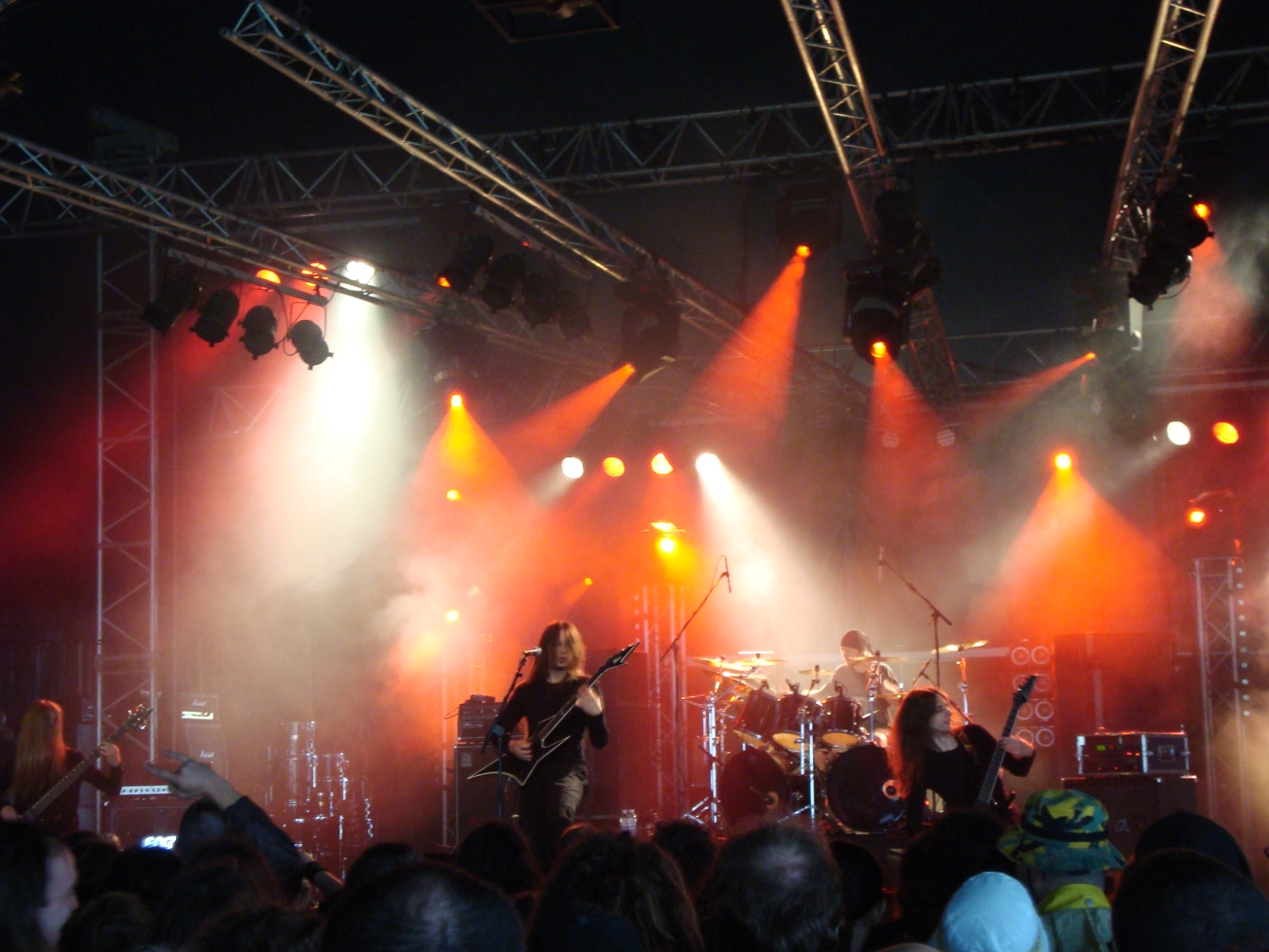 Obscura at Hellfest 2010.